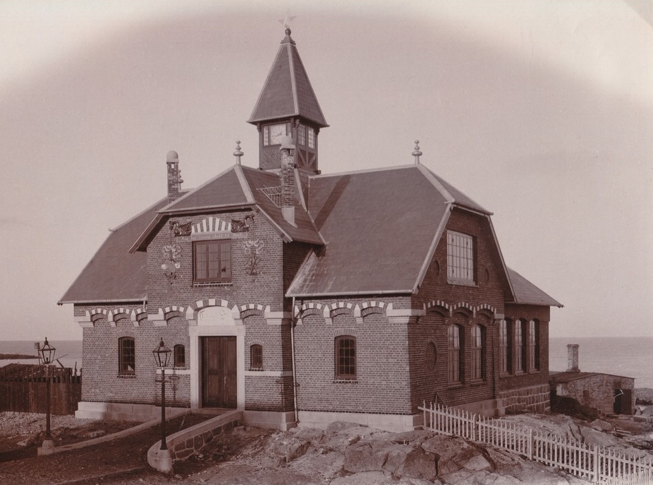 Allinge Tekniske Skole i 1895. Siden 1970'erne benyttet som folkebibliotek.